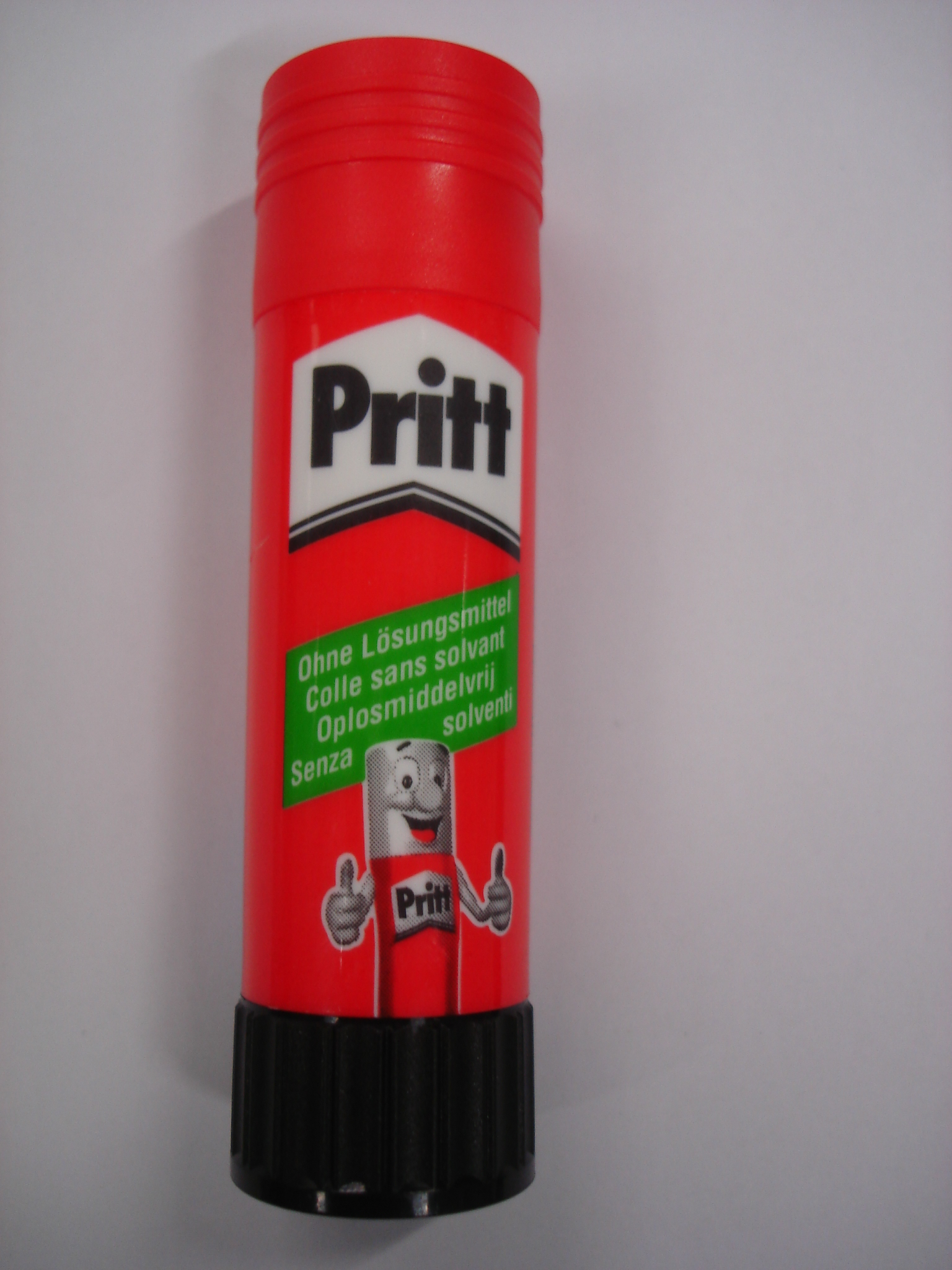 Glue stick